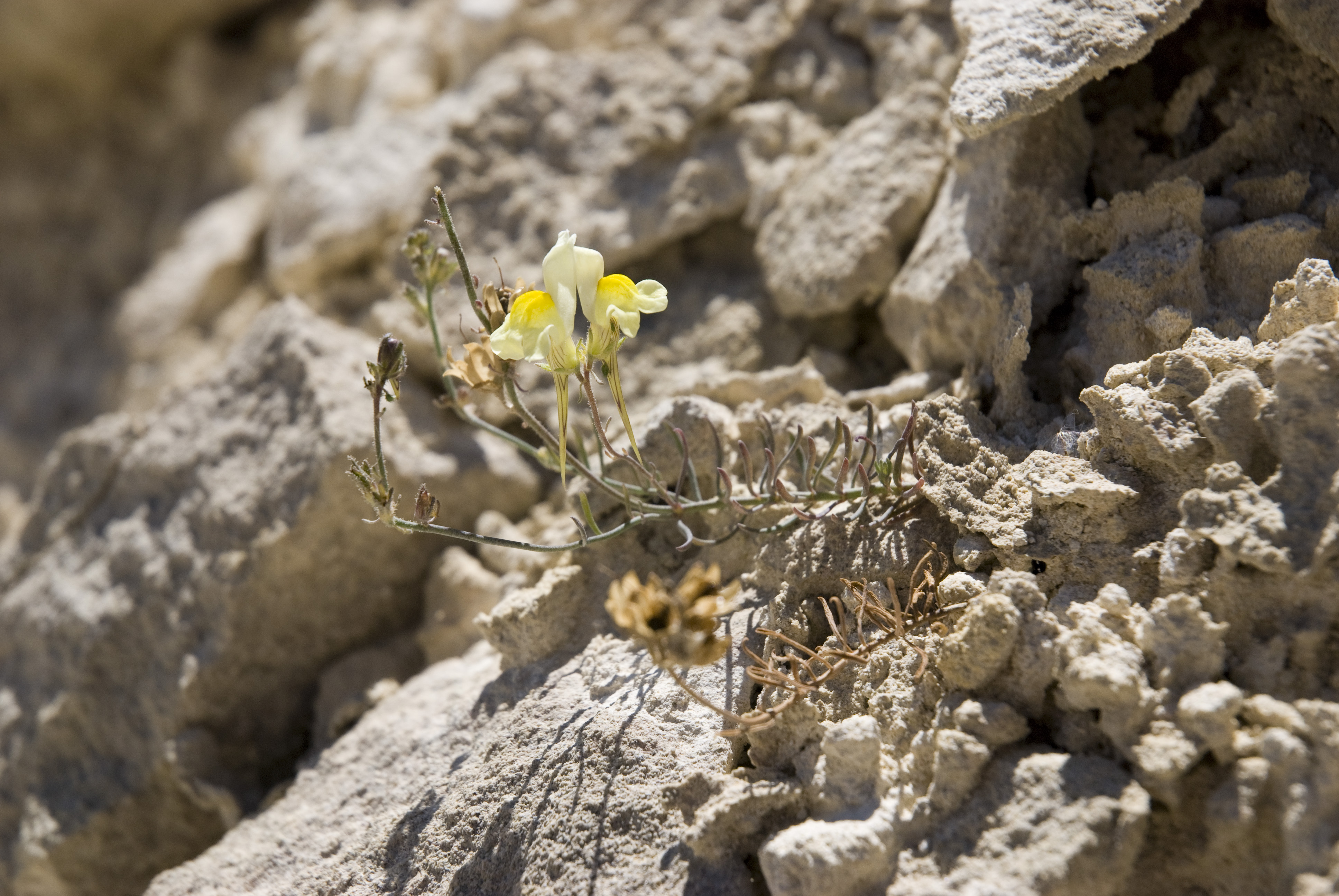 Linaria supina carrières de Saint-Vaast-lès-Mello (Oise), France